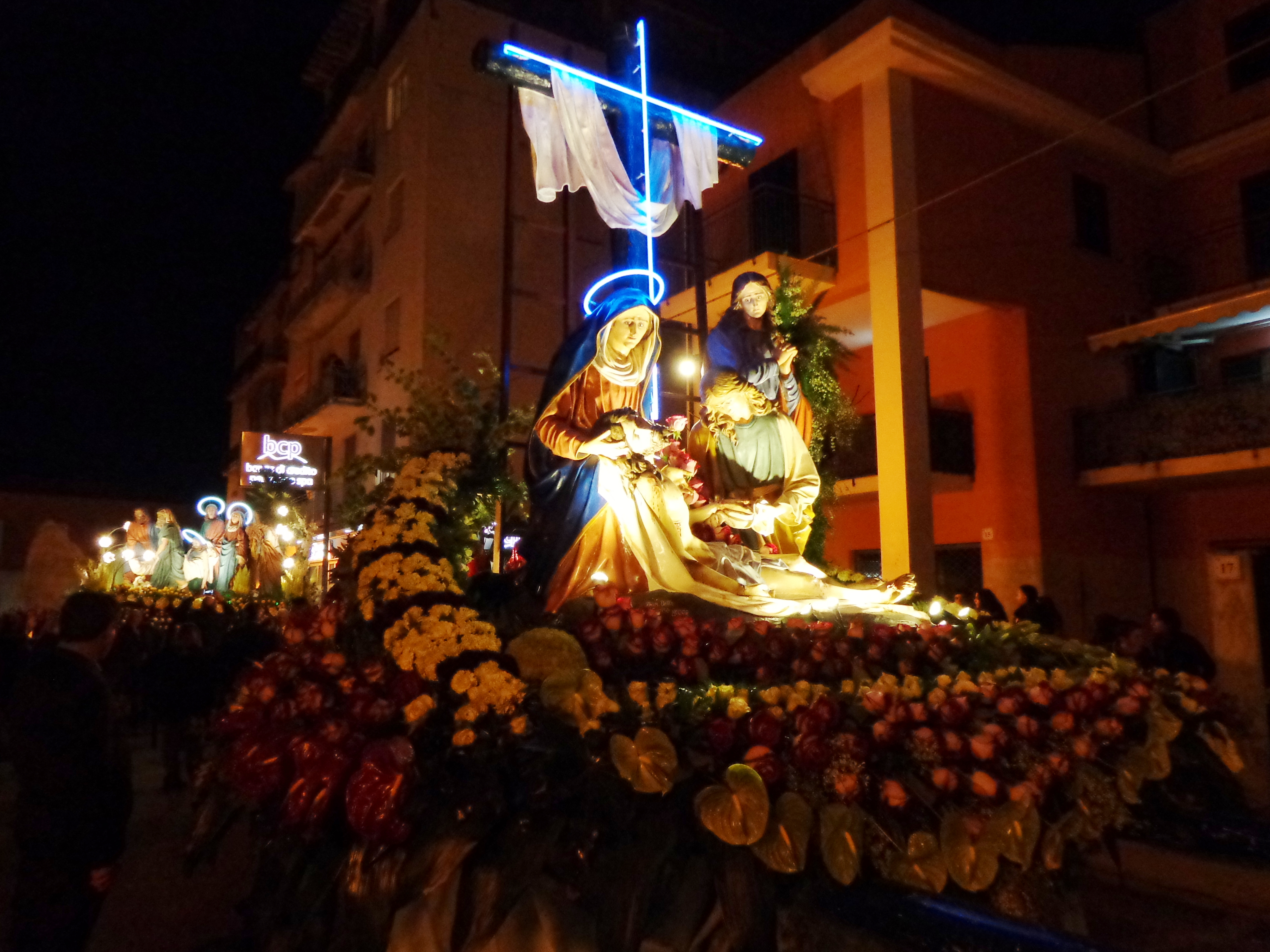 Varette_2015_20